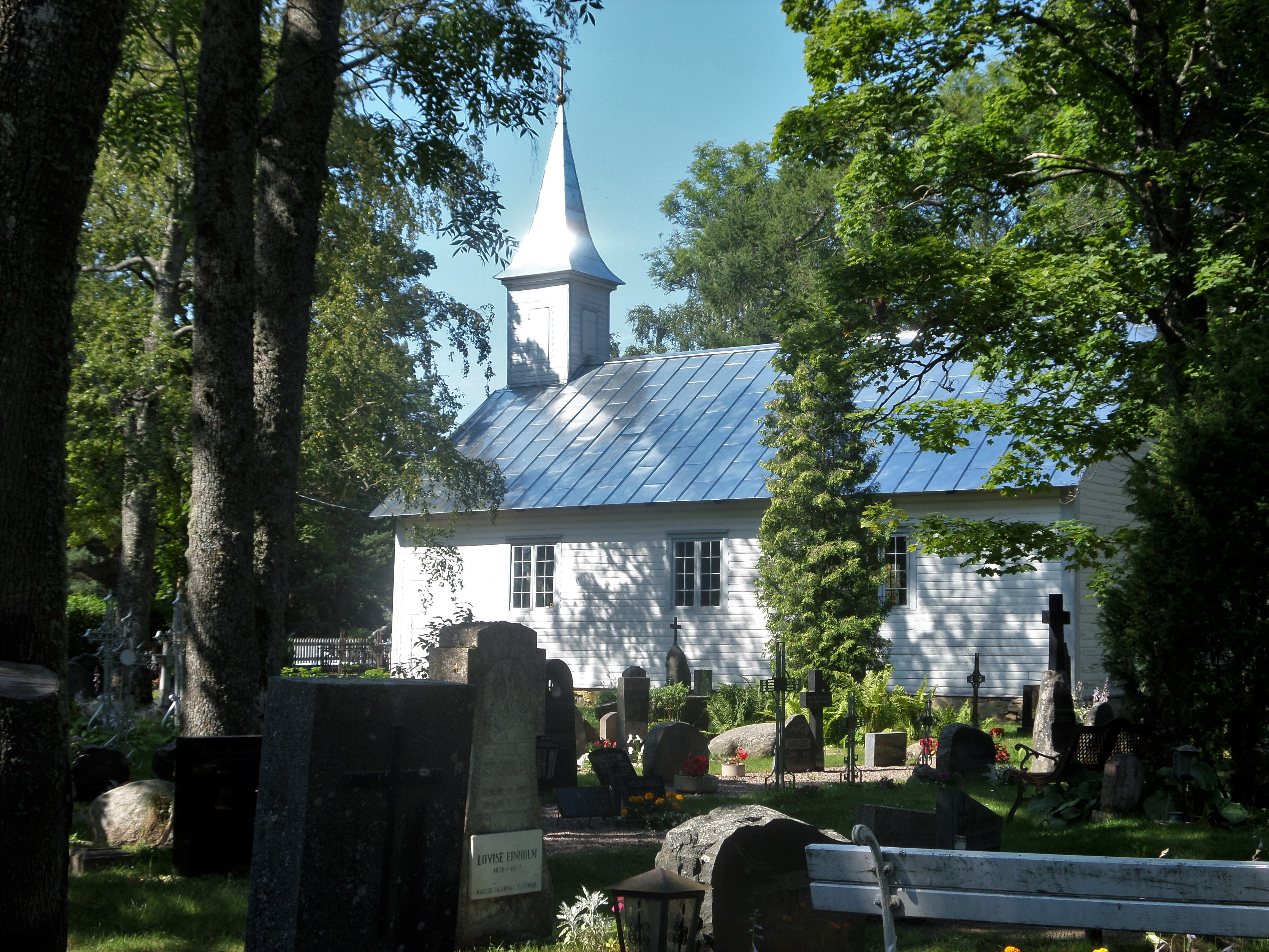 Käsmu kabel